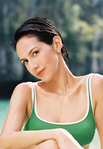 Lorie Lee